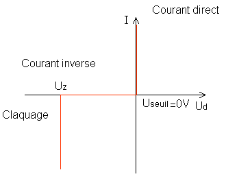 Image faite maison, par moi. Je mets cette image dans le domaine public.